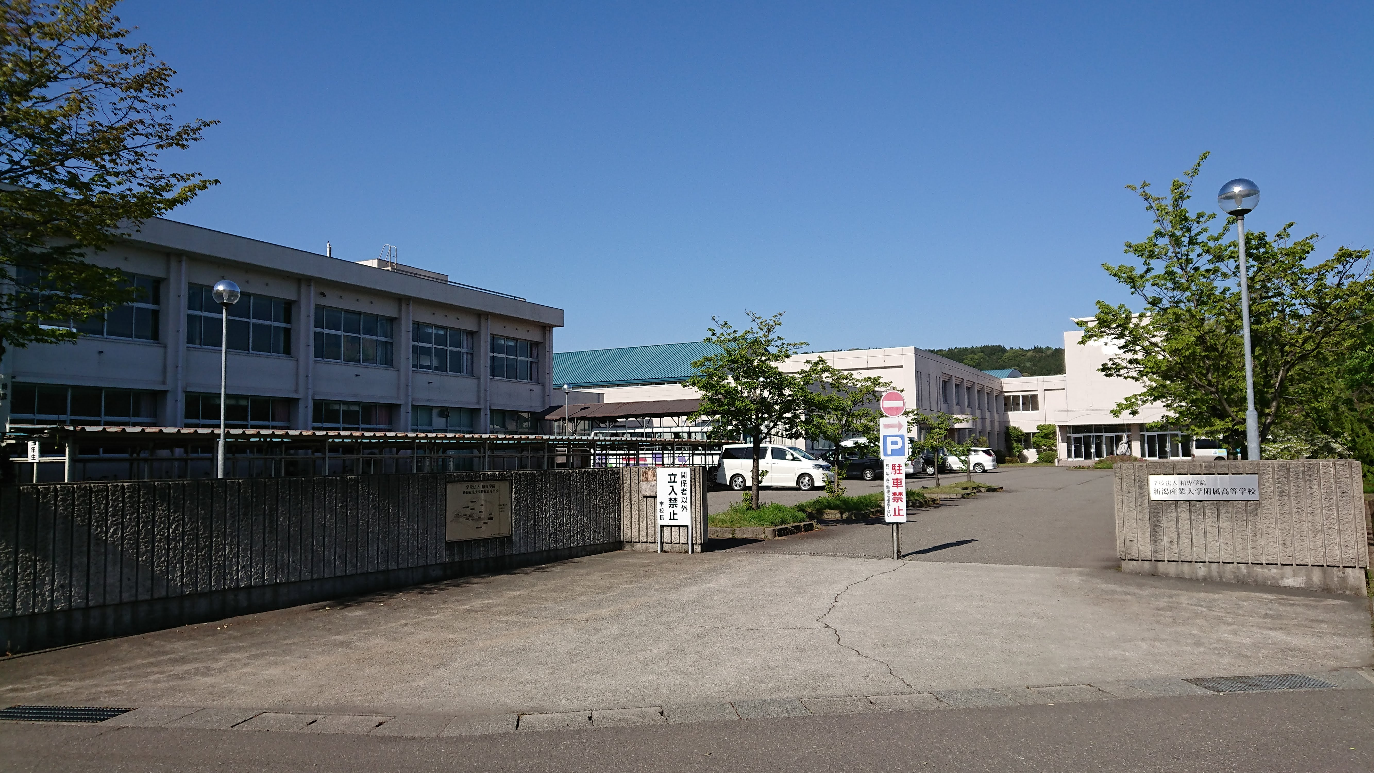 新潟産業大学付属高等学校の校舎外観